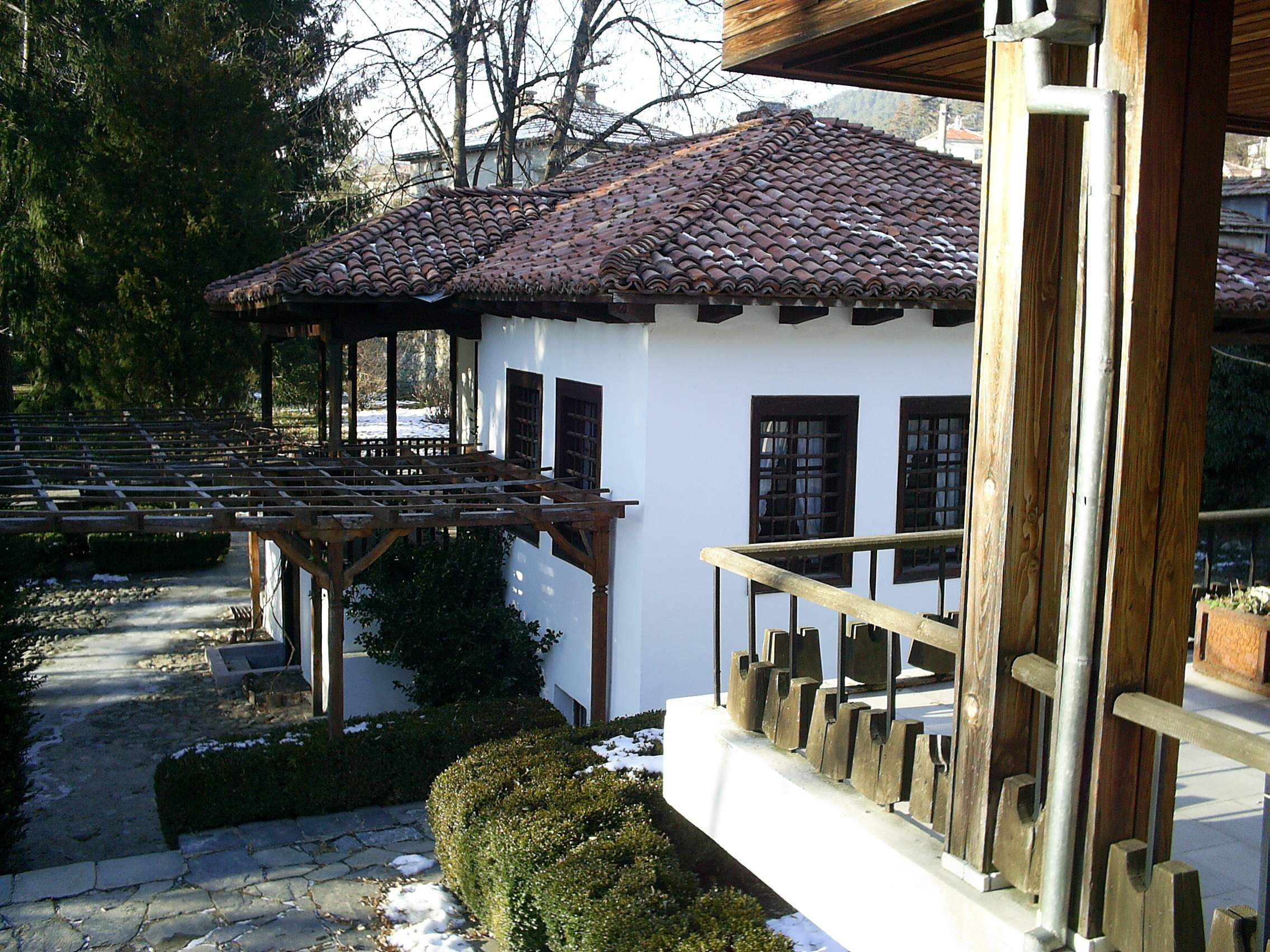 Родната къща на Христо Ботев, изглед от НМ "Христо Ботев". Hristo Botev's house in Kalofer, Bulgaria